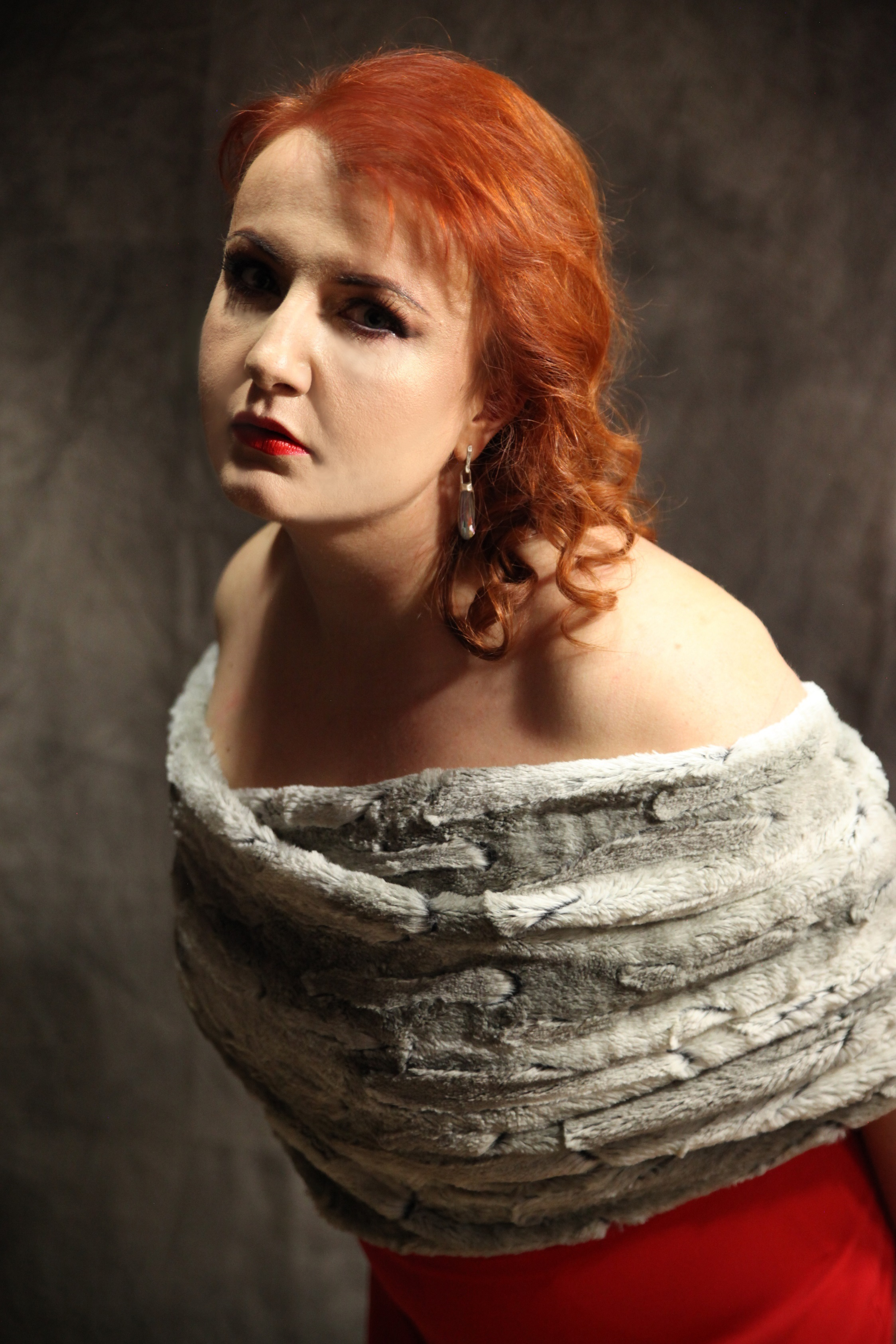 Katarzyna Oleś - Blacha fot. Piotr Suchodolski